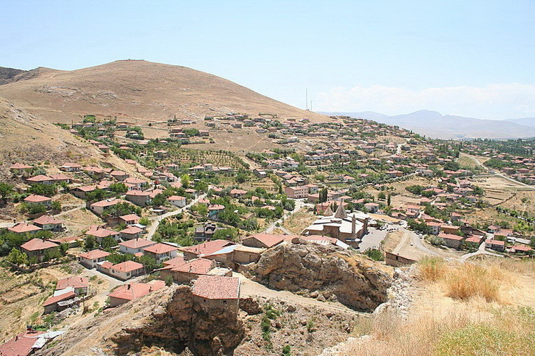 Ulu Cami ve Darüşşifa; Great Mosque and Hospital, Divriği, Sivas, Turkey